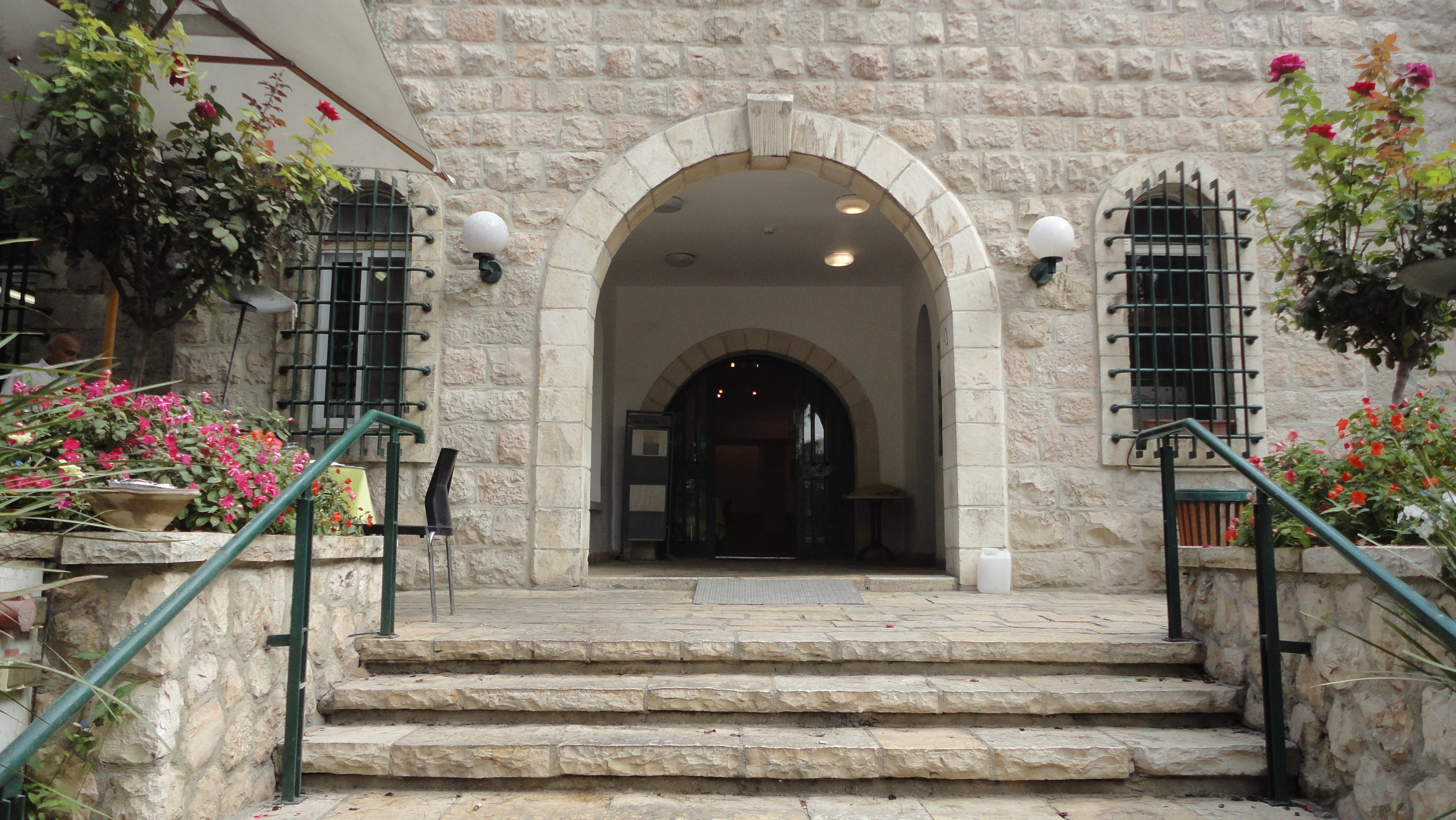 בית טיכו הוא אחד הבתים הראשונים בירושלים שנבנו מחוץ לחומות העיר העתיקה. הבית שימש למגוריהם ועבודתם של האומנית אנה טיכו ובעלה הרופא החוקר אברהם אלברט טיכו. כיום המקום משמש כמוזיאון המנציח את פועלם.